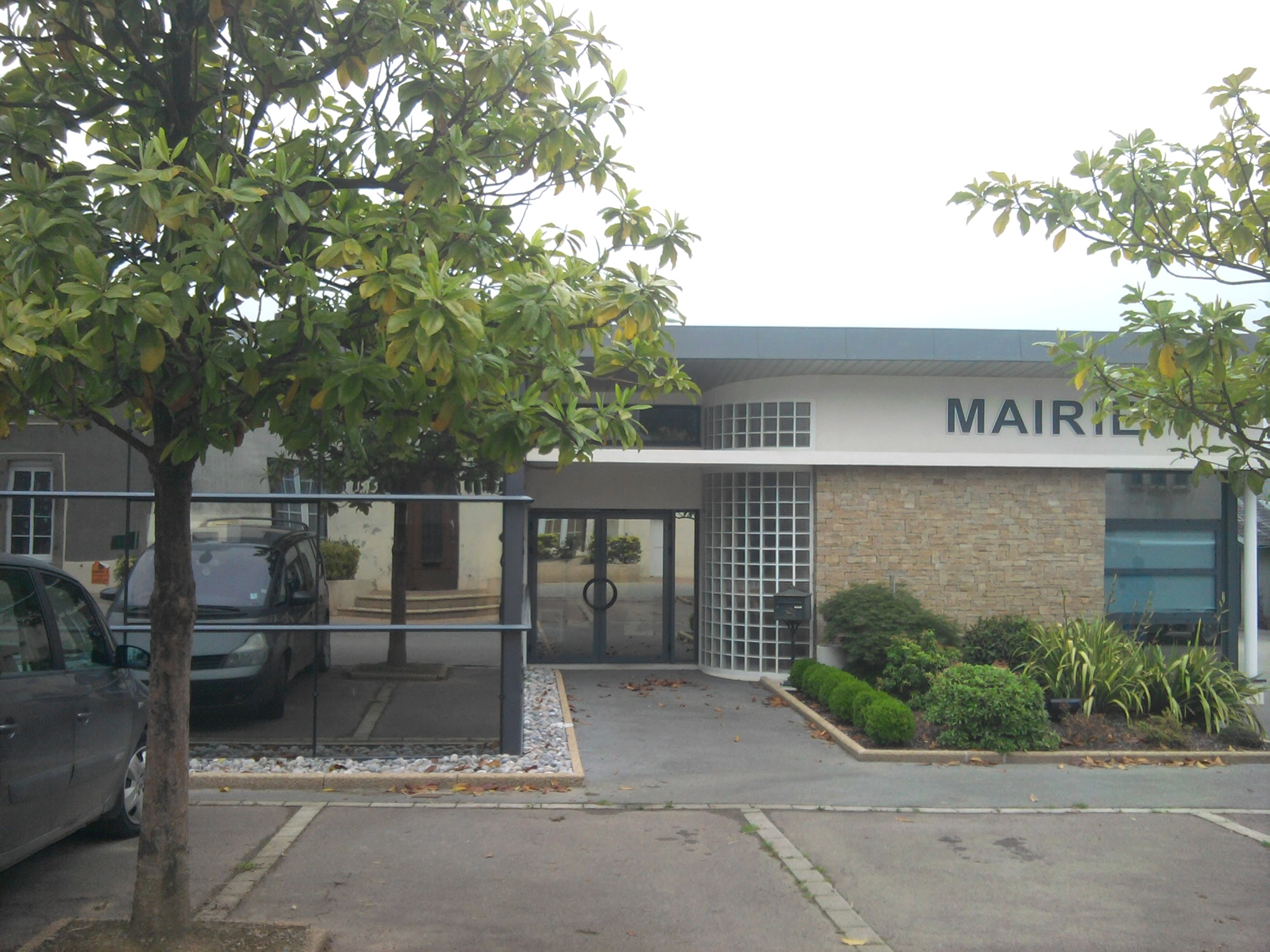 Siège de la Mairie de Lothey, Finistère (France)